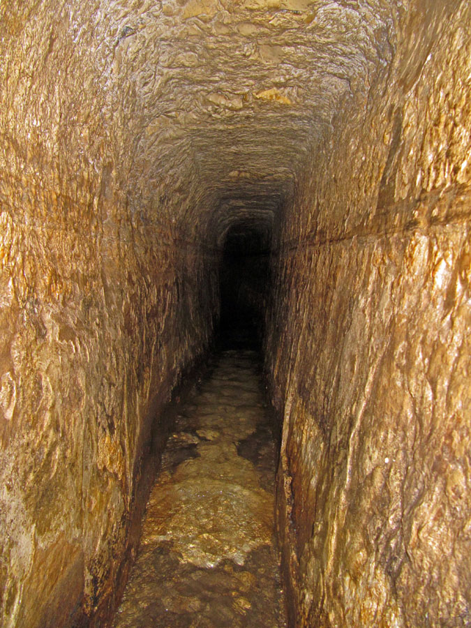 Hezekiah's Tunnel נקבת השילוח